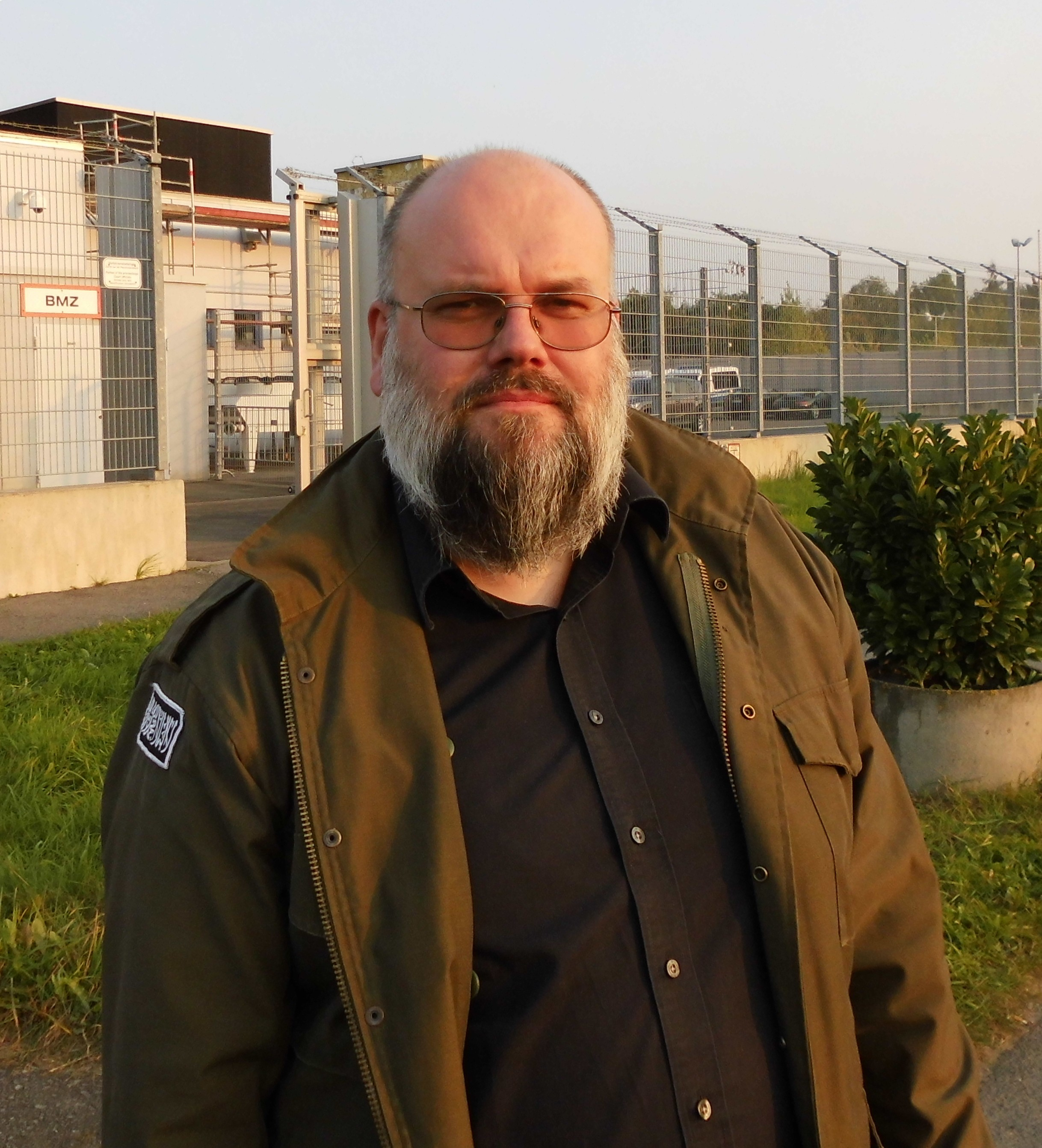 Bernhard Falk aka Bernhard Uzun aka Muntasir bi-llah; born 1967